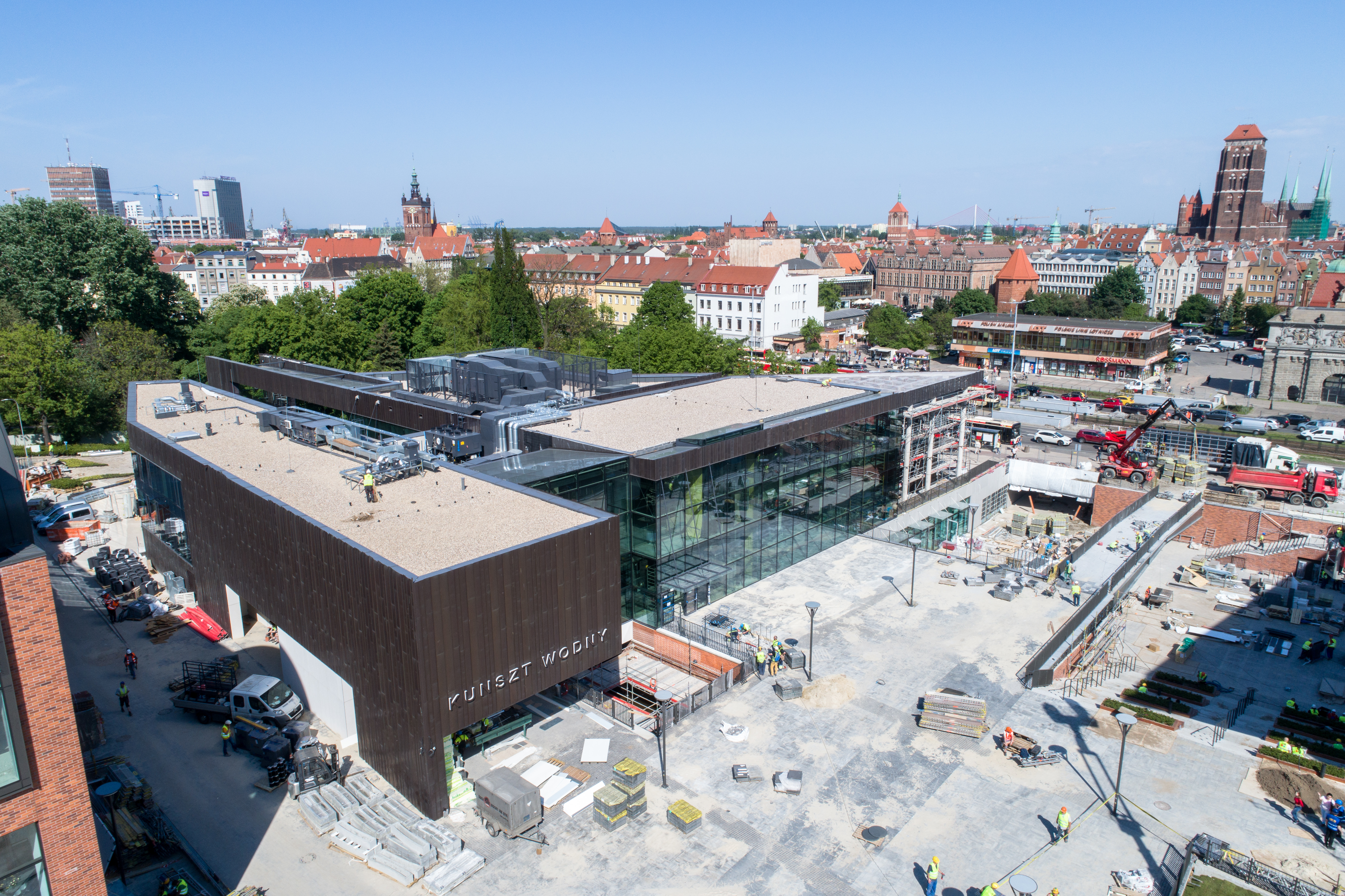 Budynek Kunsztu Wodnego, siedziba Instytutu Kultury Miejskiej (ul. Targ Rakowy 11) od listopada 2018.